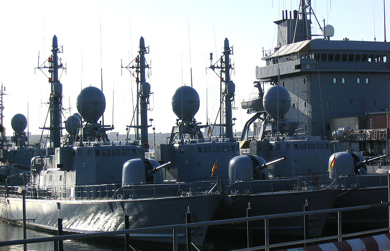 Beschreibung: Schnellboote im Kieler Hafen / Typ-Klasse 143 bzw. 143A Fotograf: Darkone, 23. August 2003